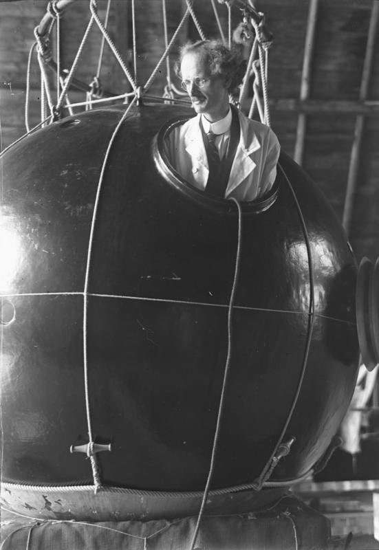 Der Flug mit dem Luftballon in die Stratosphäre! Der Schweizer Prof. Piccard will mit einem Ballon in bisher unerreichte Höhen fliegen, um dort wissenschaftliche Forschungen zu unternehmen. Die Gondel des Ballons besteht aus einer Alluminium-Kugel, welche einen Umfang von 6 1/2 m und eine Höhe von 2 1/2 m hat. Die Alluminiumkugel kann hermetisch verschlossen werden, um die kühnen Forscher vor der enormen Kälte und den gefährlichen ultravioletten Strahlen zu schützen. - Prof. Piccard verläßt die Ballon-Kugel durch das Bullauge..